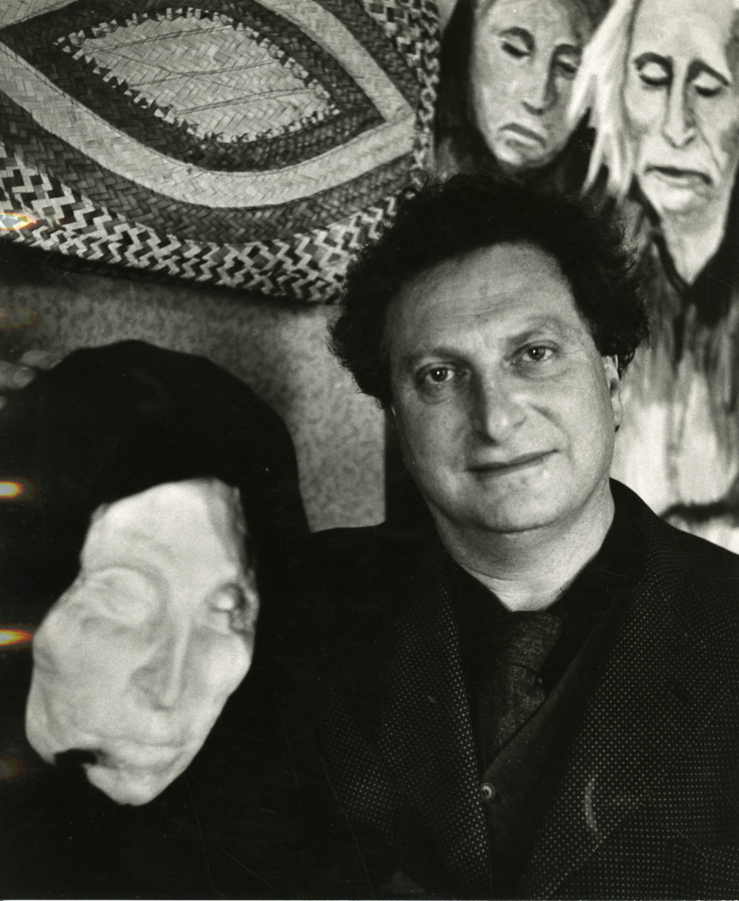 Località non identificata. Ritratto di Carlo Levi. Servizio fotografico : Italia, 1975 / Paolo Monti. - Stampe: 2 : Positivo b/n, gelatina bromuro d'argento/ carta, 24x30. - ((Al verso delle stampe manoscritto: "Carlo Levi". Sul coperchio della scatola manoscritto: "Ritratti".